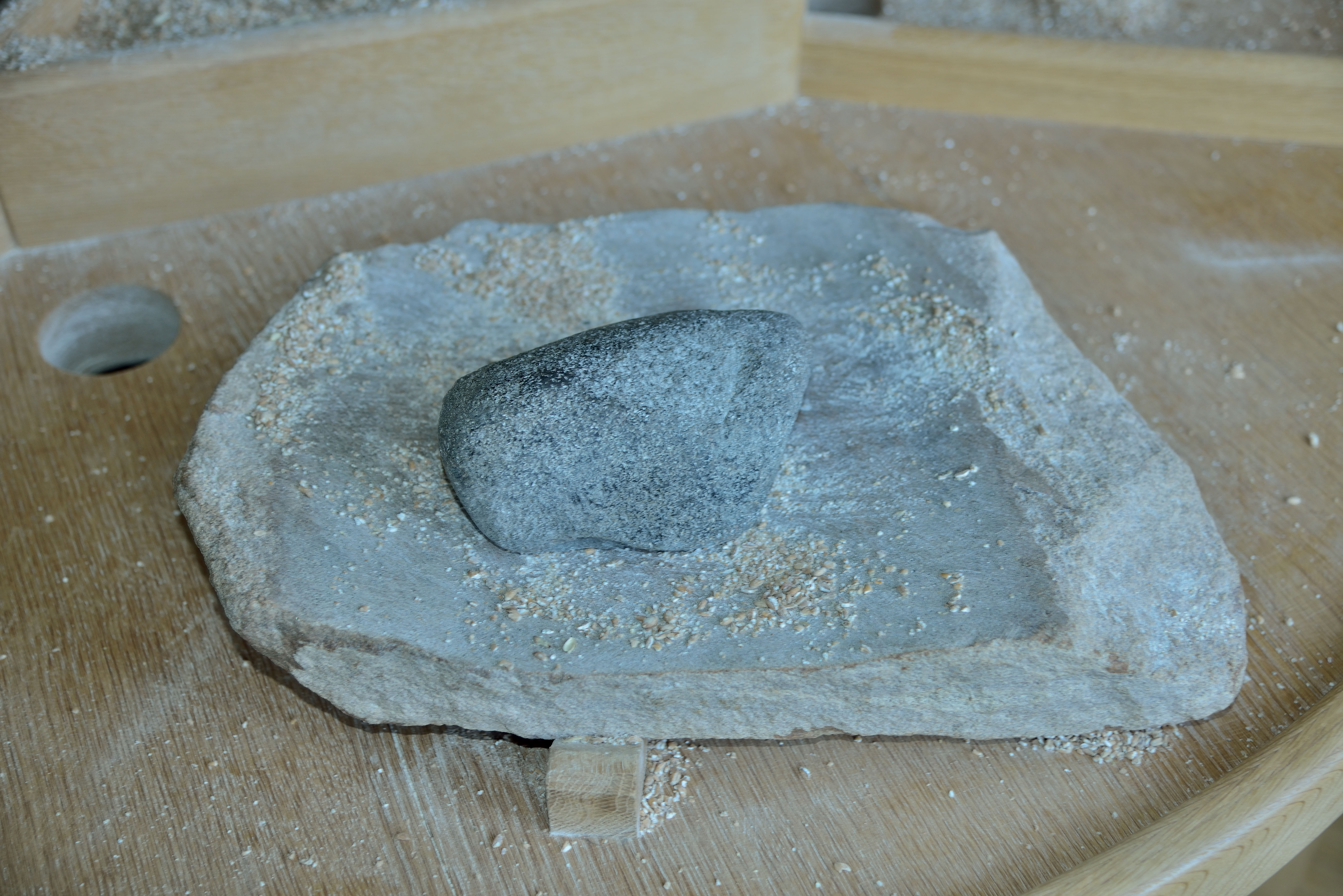 Mühlenverein im Kreis Minden-Lübbecke, Mühlenbauhof Petershagen-Frille, wooden